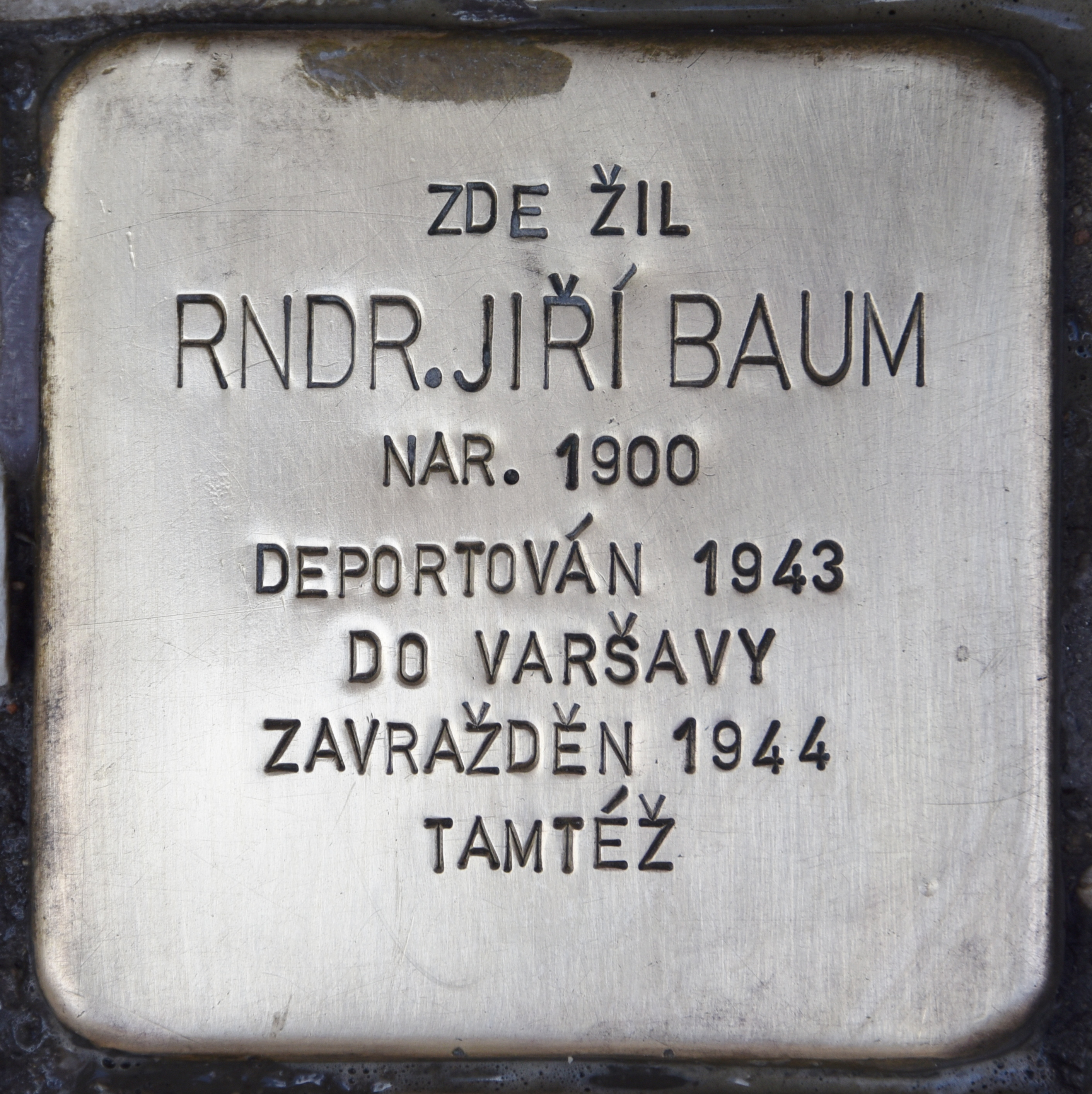 Stolperstein für Jiri Baum